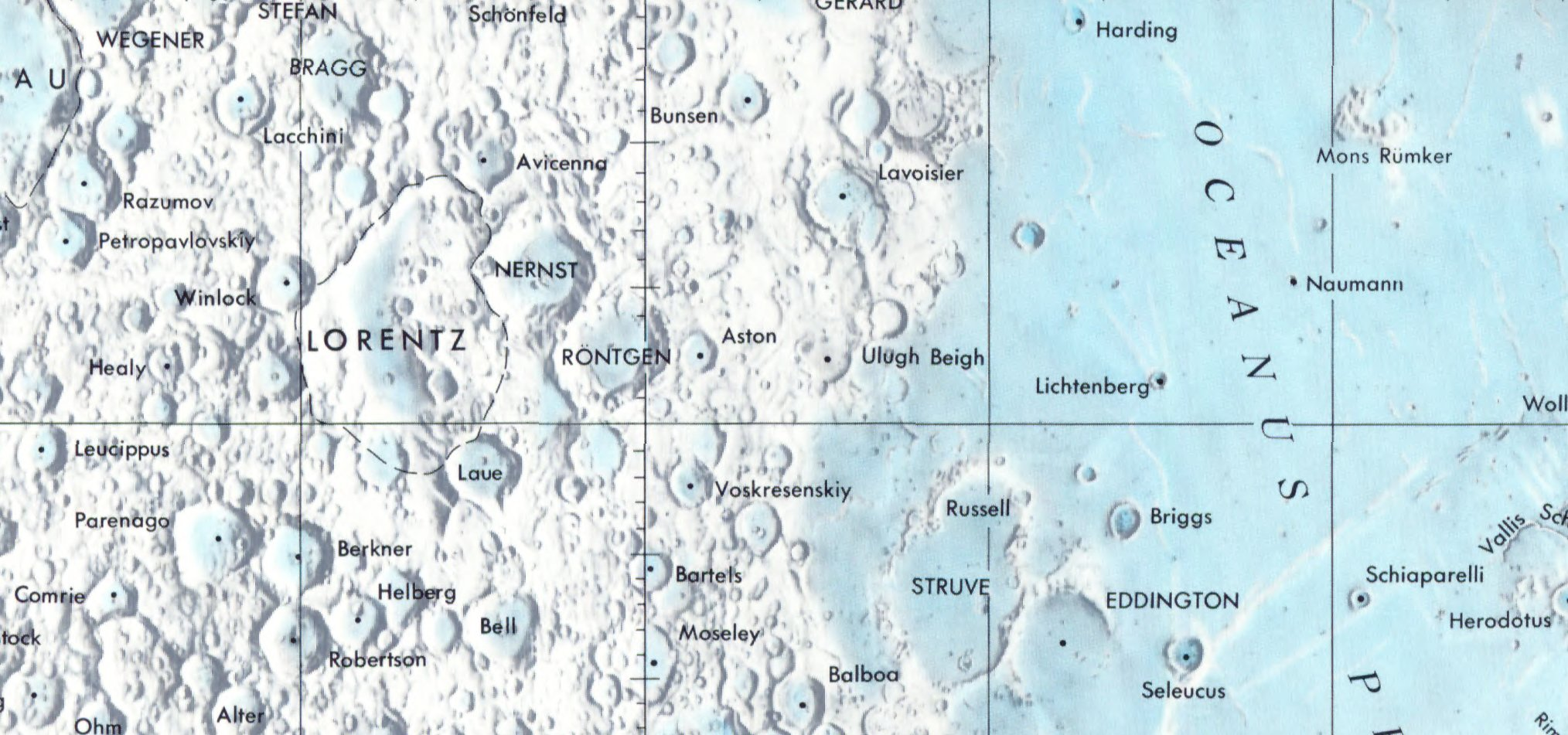 Cráter lunar Ulugh Beigh. Localización. (Lunar Chart LPC1. Second Edition)